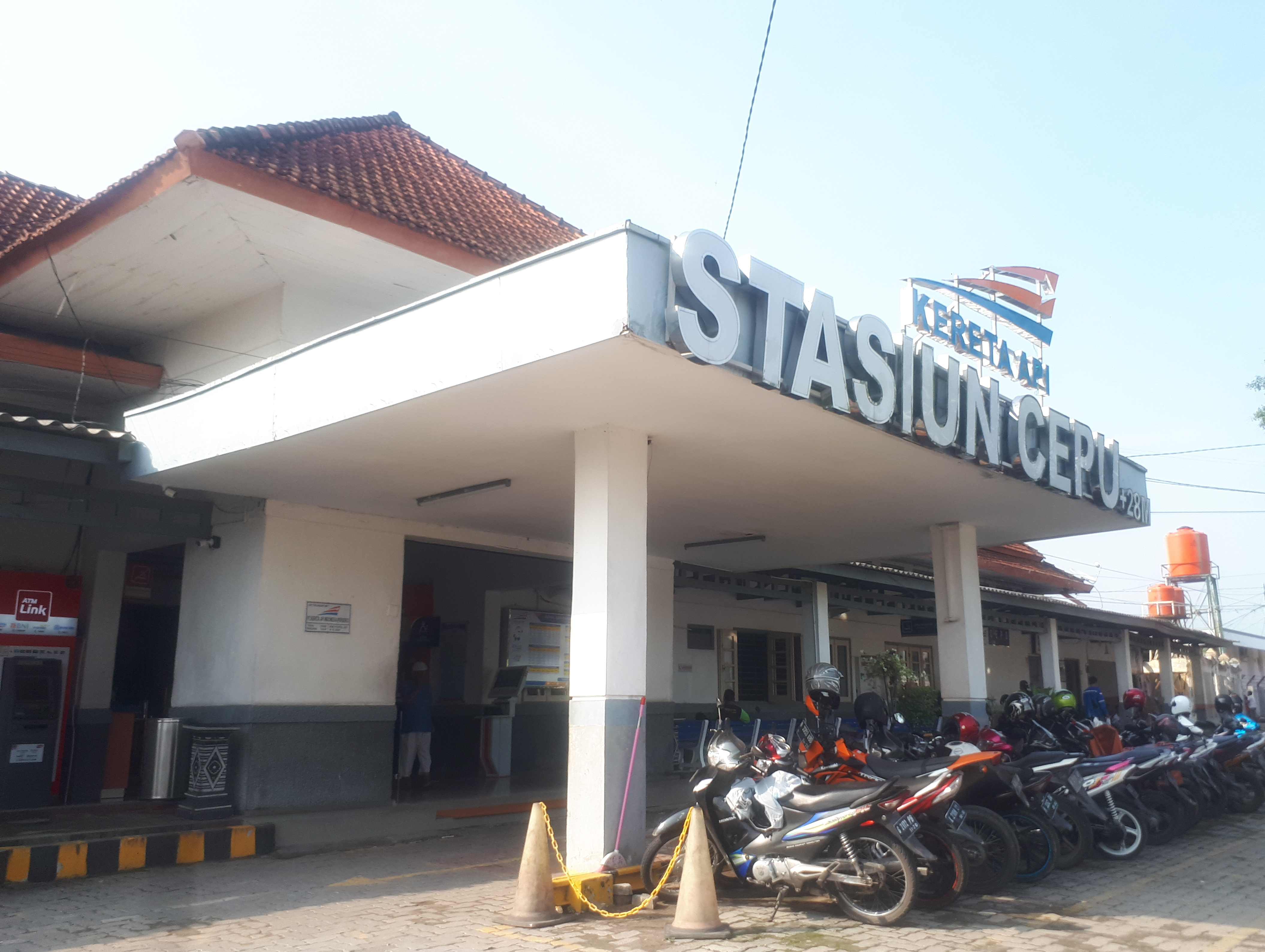 Tampak depan Stasiun Cepu tahun 2020